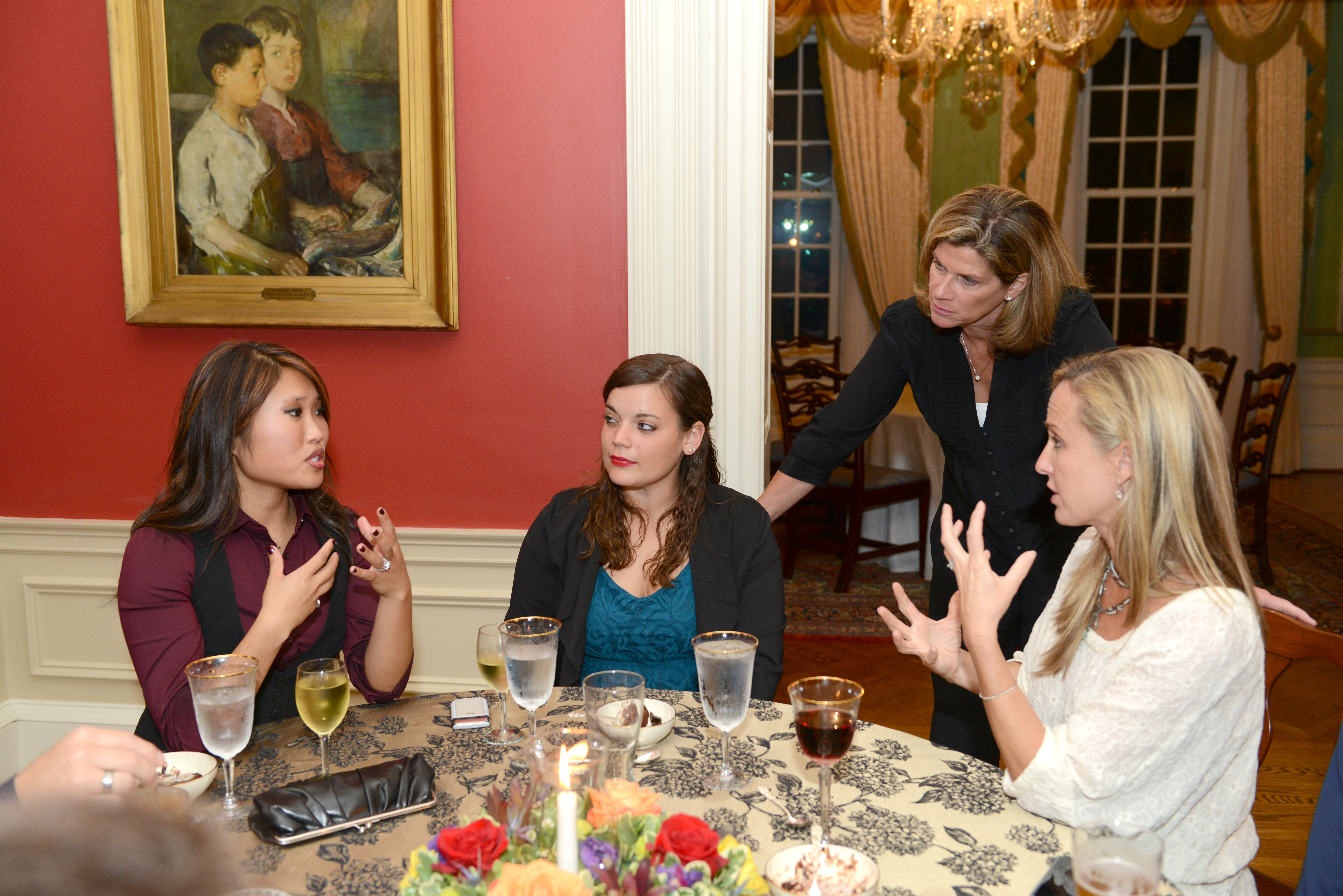 Rodzina przy śniadaniu lub rodzina na spacerze (tak, aby było widać, że członkowie rodziny ze sobą dyskutują, coś omawiają) English | Polski | +/−